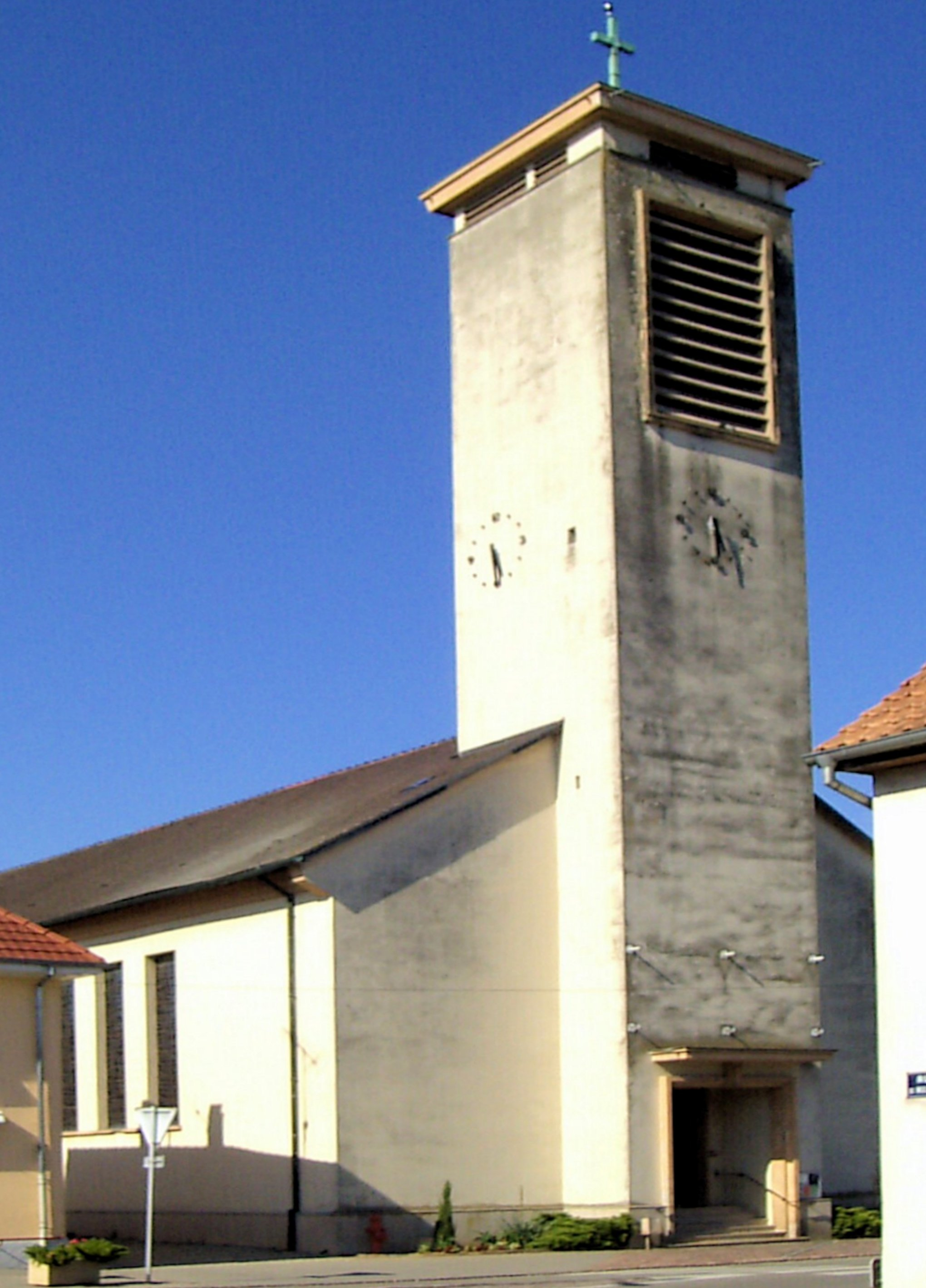 L'église Sainte-Agathe à Munchhouse